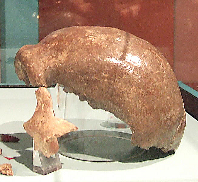 Schädeldecke des 1856 gefundenen Neandertalers Ort der Aufnahme: Rheinisches Landesmuseum Bonn Aufnahme: 10. September 2005 Url